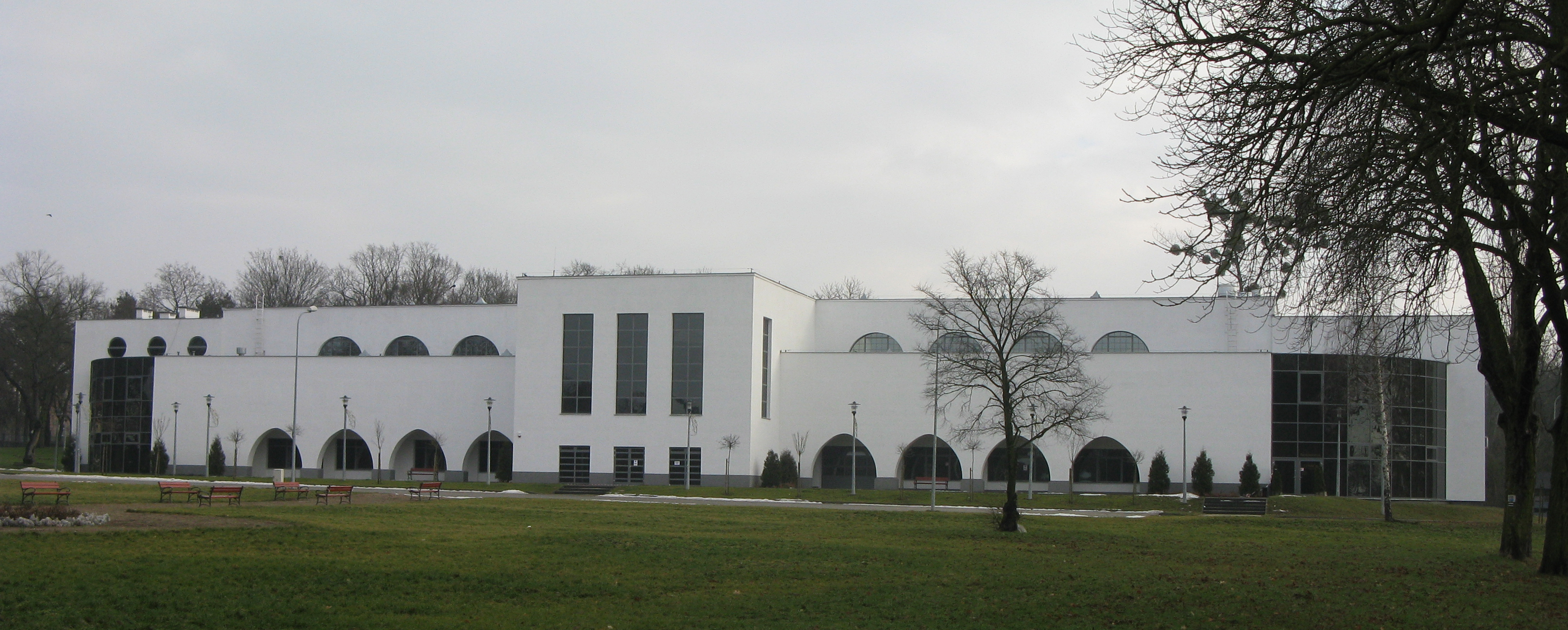 Budynek Hali wystawowej w Toruniu z 1928